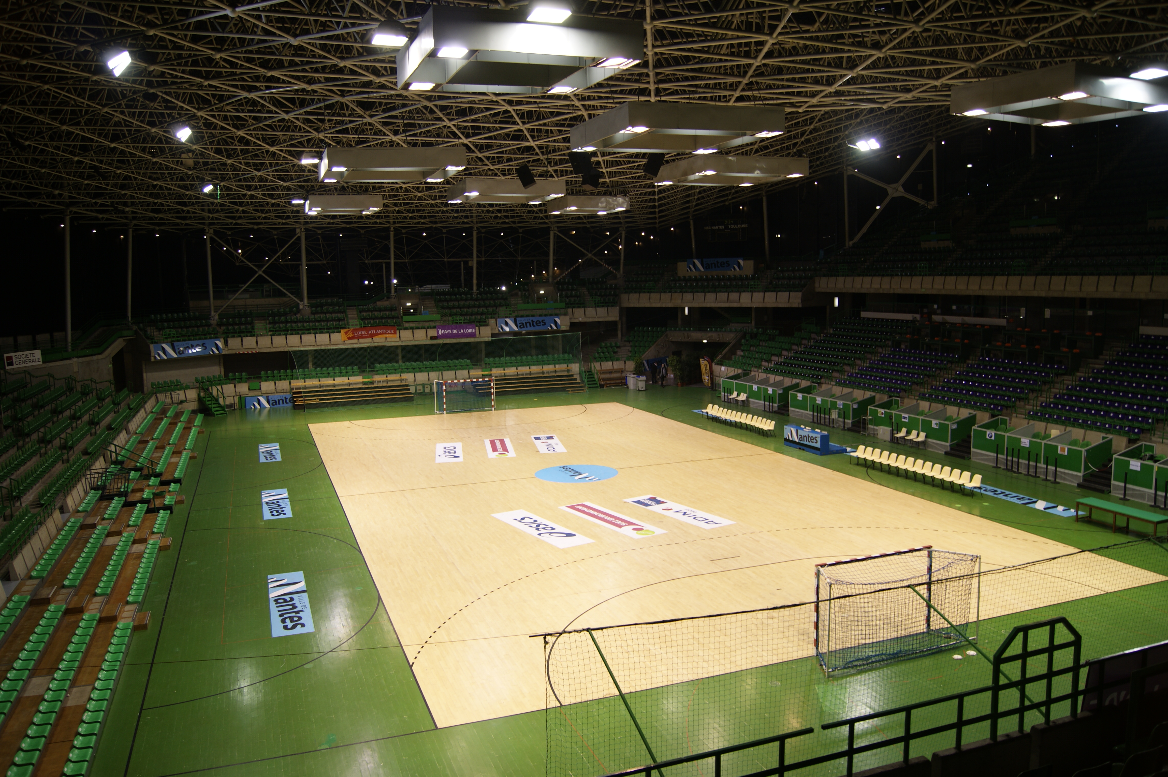 Le Palais des Sports de Beaulieu à Nantes après un match du HBC Nantes.